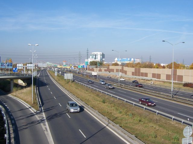 Praha-Chodov, začátek dálnice D1 / Czech Republic, Prague-Chodov, Highway D1